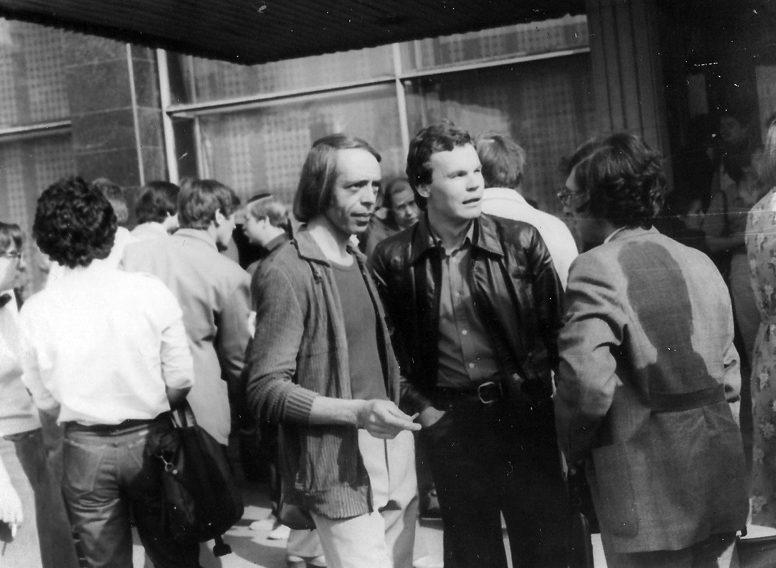 Пётр Вегин (в центре - слева). Справа - Юрий Беликов. В кулуарах VIII-го Всесоюзного совещания молодых писателей, 1984 год.